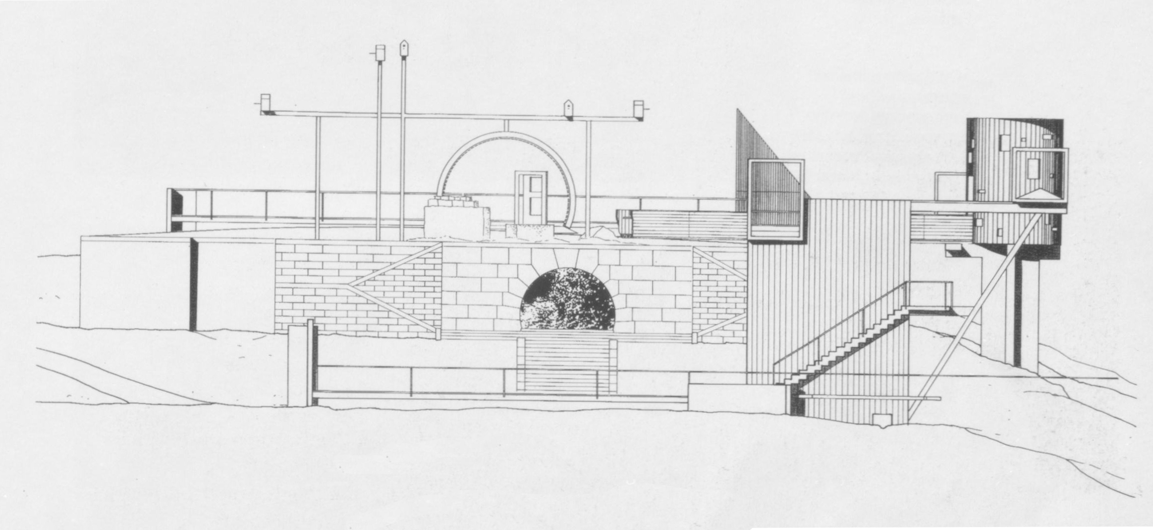 Hans Dieter Schaal: Nord-Süd-Querschnitt in drei Ebenen der Kunststation Villa Moser, Stuttgart, 1993. Vordere Ebene: Untergeschossfassade der Villa Moser mit Grotte. Mittlere Ebene: Belvedere. Hintere Ebene: Laube.